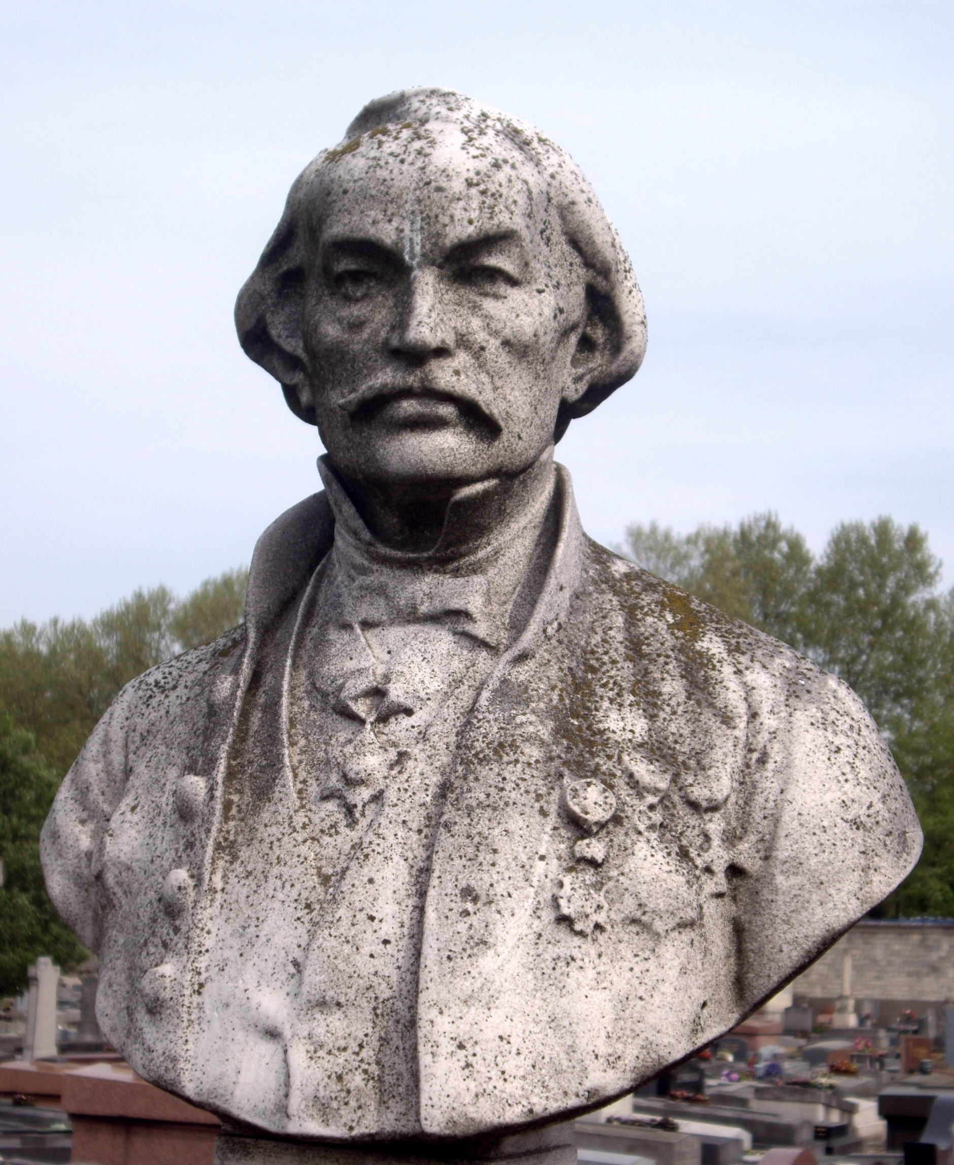 Tombe d'Albin de Kazimirski Biberstein, cimetière de Montrouge, division 19. Buste.